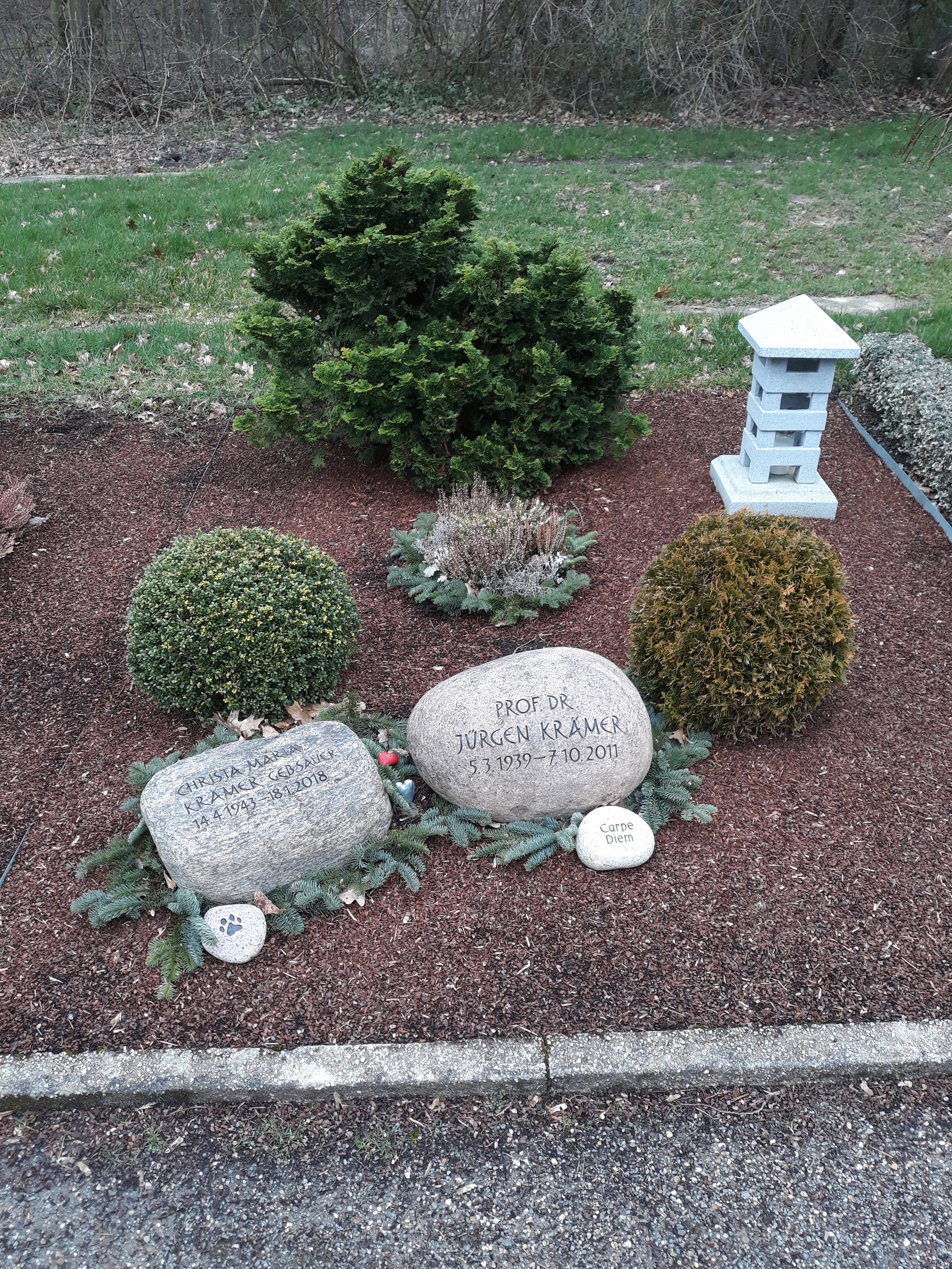 Das Grab des deutschen Orthopäden und Hochschullehrers Jürgen Krämer und seiner Ehefrau Christa Maria auf dem Friedhof Querenburg in Bochum.